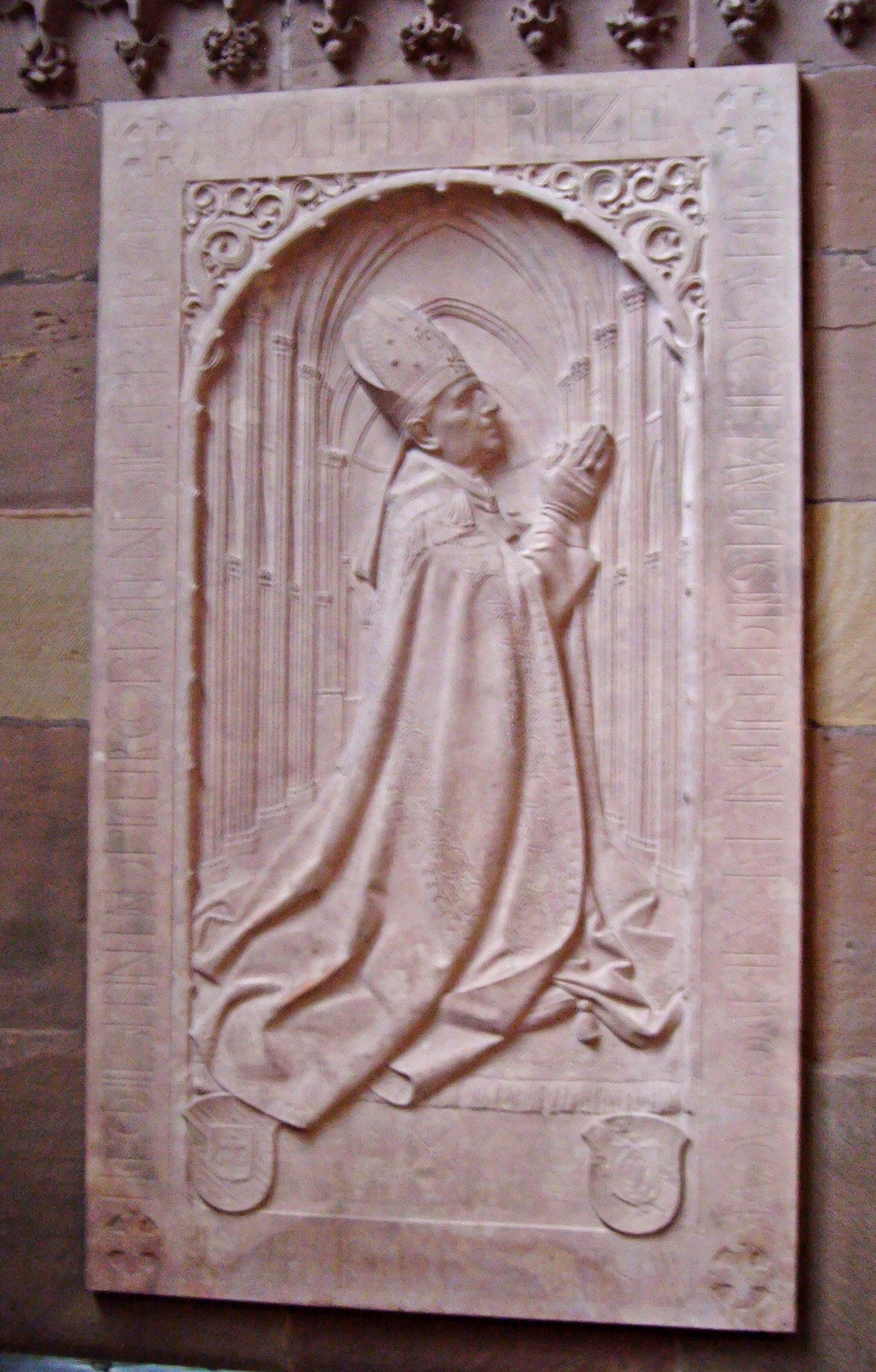 Epitaph Bischof Adolf Fritzen (1838-1919), Straßburger Münster